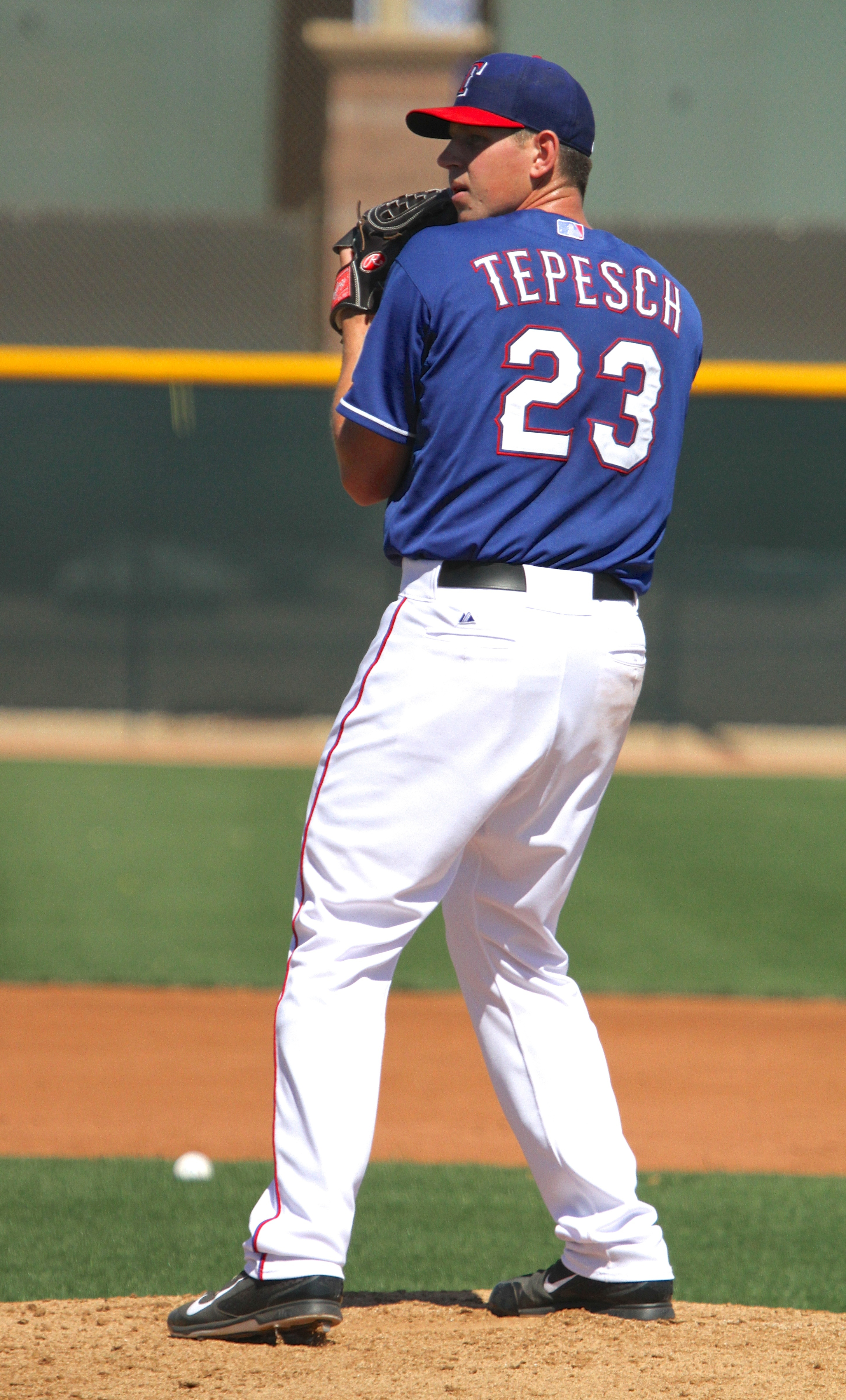 Nick Tepesch